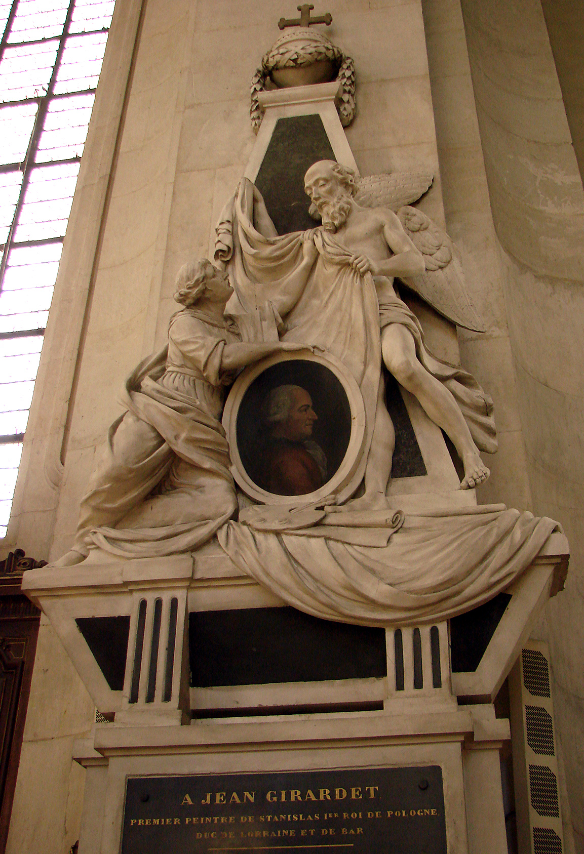 Église Saint-Sébastien de Nancy. Tombeau de Jean Girardet (Lunéville 1709 - Nancy 1778) (tombeau refait en 1801 par Joseph Labroise après destruction de l'original de Johann Joseph Söntgen).